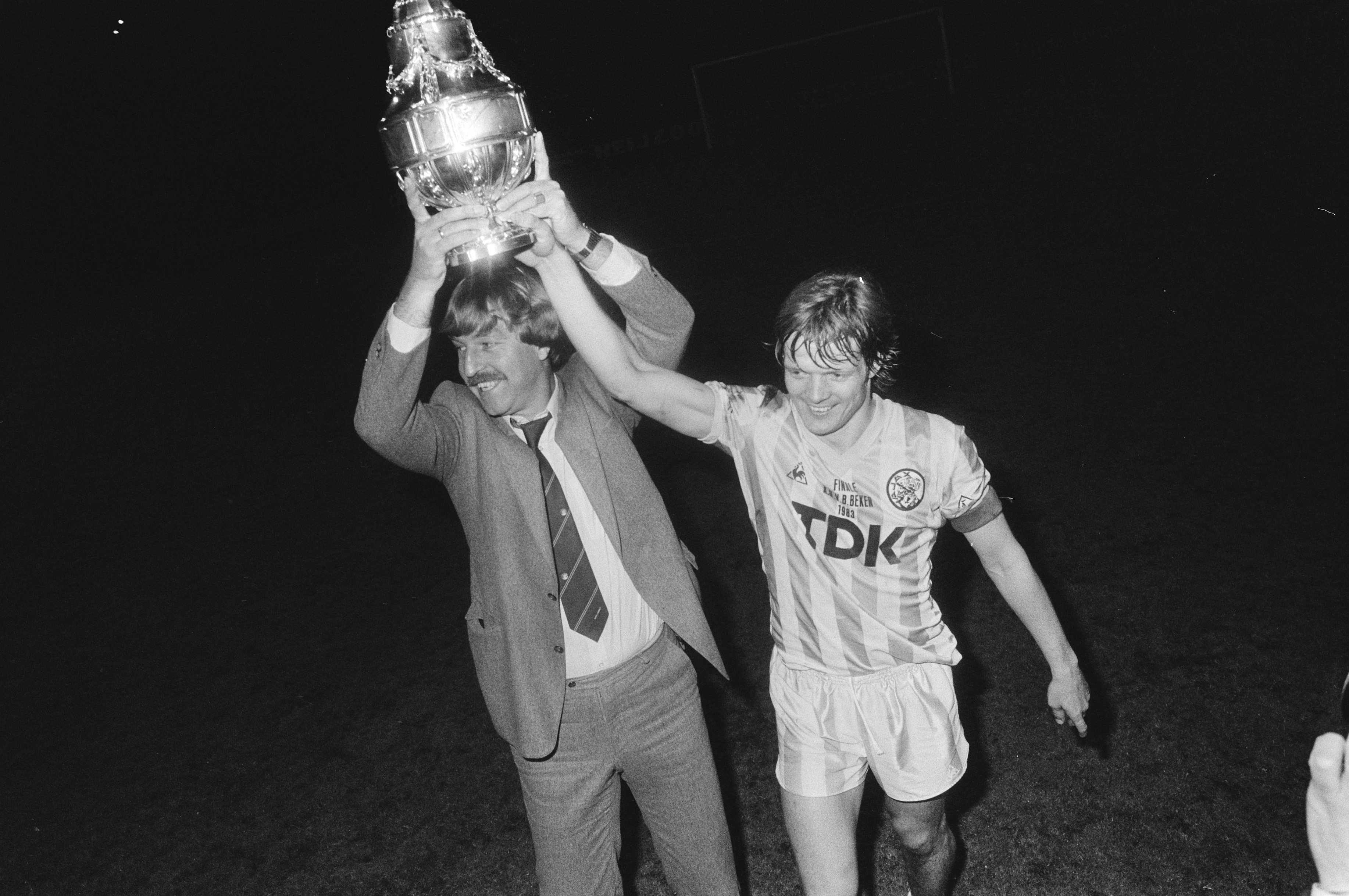 Collectie / Archief : Fotocollectie Anefo Reportage / Serie : Finale KNVB-bekerwedstrijd NEC tegen Ajax 1-3 Beschrijving : Aad de Mos en Sören Lerby (r) met de beker Datum : 17 mei 1983 Locatie : Gelderland, Nijmegen Trefwoorden : sportprijzen, voetbal, wedstrijden Persoonsnaam : Lerby, Sören, Mos, Aad de Fotograaf : Bogaerts, Rob / Anefo Auteursrechthebbende : Nationaal Archief Materiaalsoort : Negatief (zwart/wit) Nummer archiefinventaris : bekijk toegang 2.24.01.05 Bestanddeelnummer : 932-5912